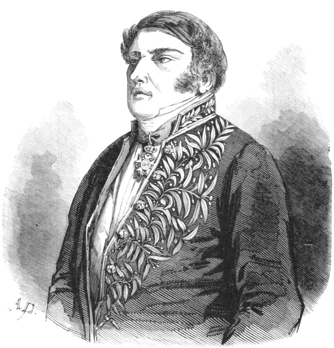 "M. de Saint-Priest, membre de l'Académie française, reçu le 17 janvier 1850".